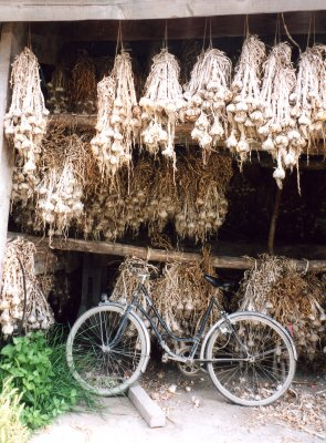 Storfa arlleg wrth dŷ preifat yng ngogledd Ffrainc